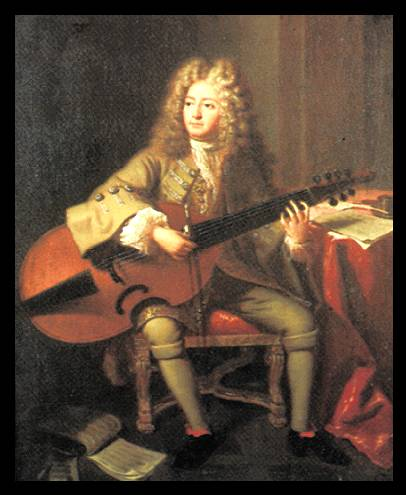 Retrato do compositor francês e virtuose da viola da gamba, Marin Marais, por André Bouys, 1704.